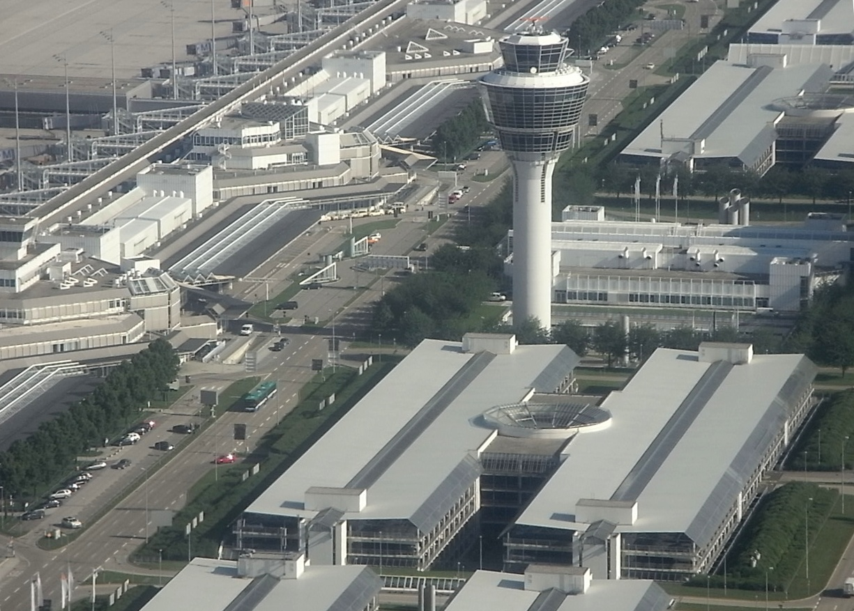 Turm des Flughafens München 2 (Franz Josef Strauß, MUC), von Südosten gesehen.